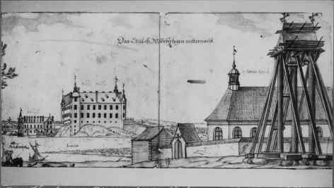 Kyrkan och klockstapeln mot norr. Foto efter skiss till förlaga till gravyr ur Suecia Antiqua. Dåvarande Esterna kyrka. Kategori: (01) ExteriörerKyrkan och klockstapeln mot norr. Foto efter skiss till förlaga till gravyr ur Suecia Antiqua. Dåvarande Esterna kyrka.